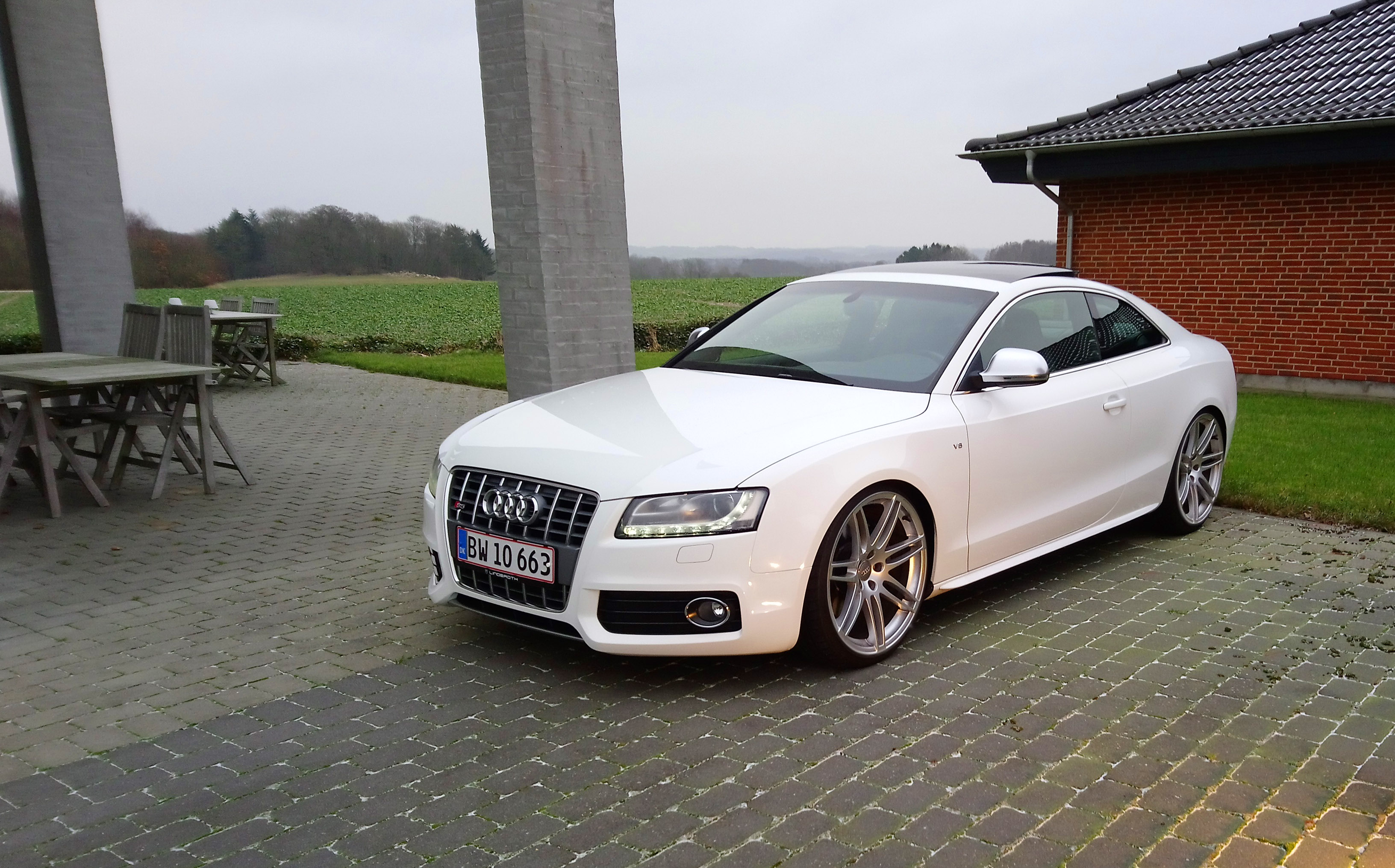 Audi S5 4.2L V8 FSI MT Quattro Coupé årgang 2008. Audi RS4 20" fælge.